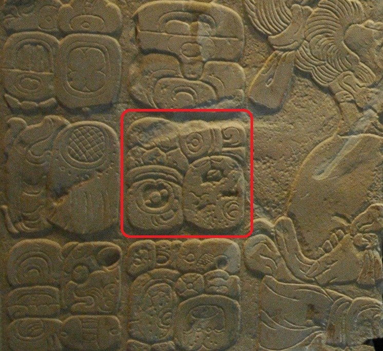 Glifo que muestra el nombre del ajaw maya B'utz Aj Chiik en el tablero del Templo XVII de Palenque